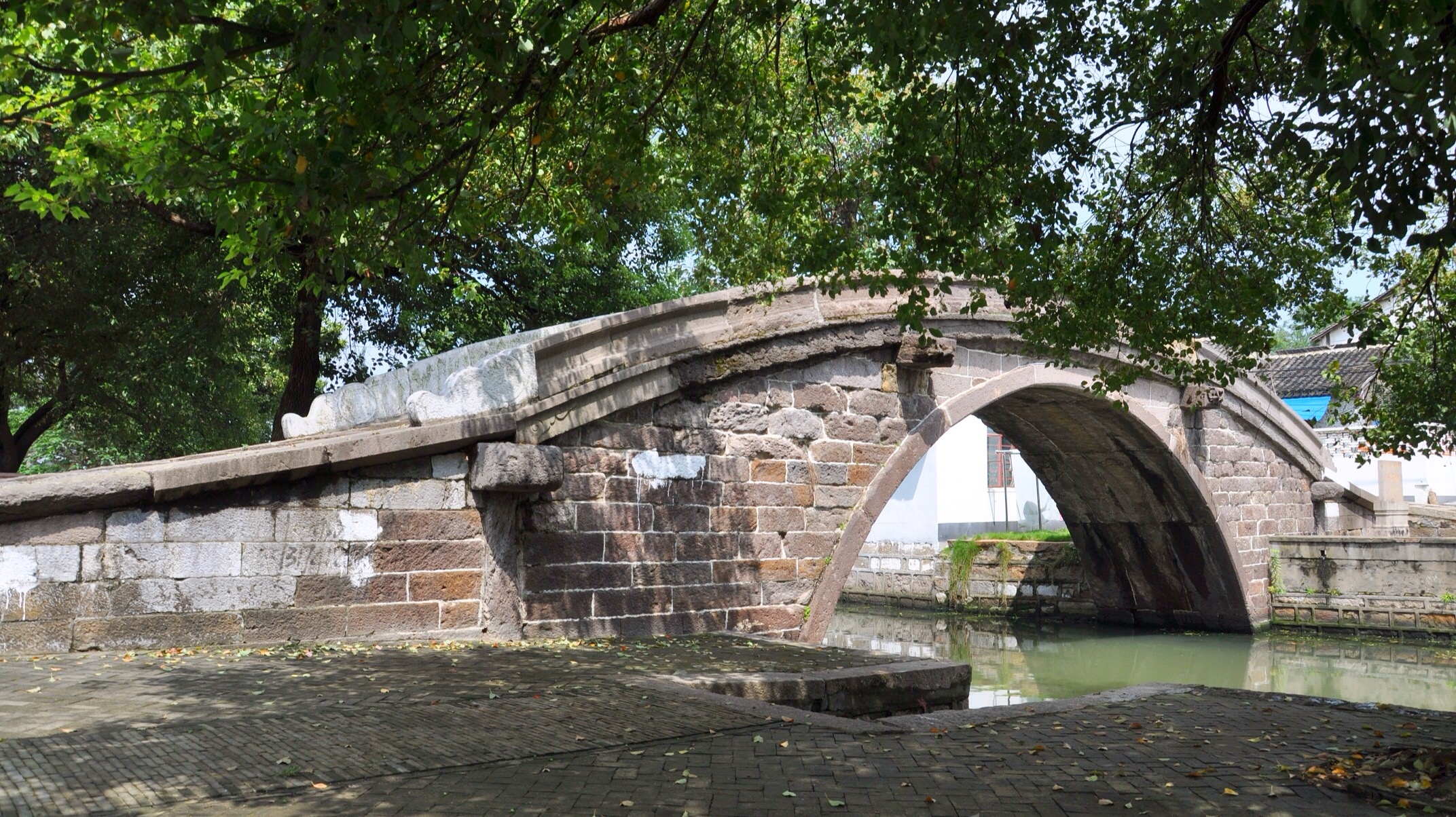 普济桥 金泽镇南市梢 北宋咸淳元年(1265年)